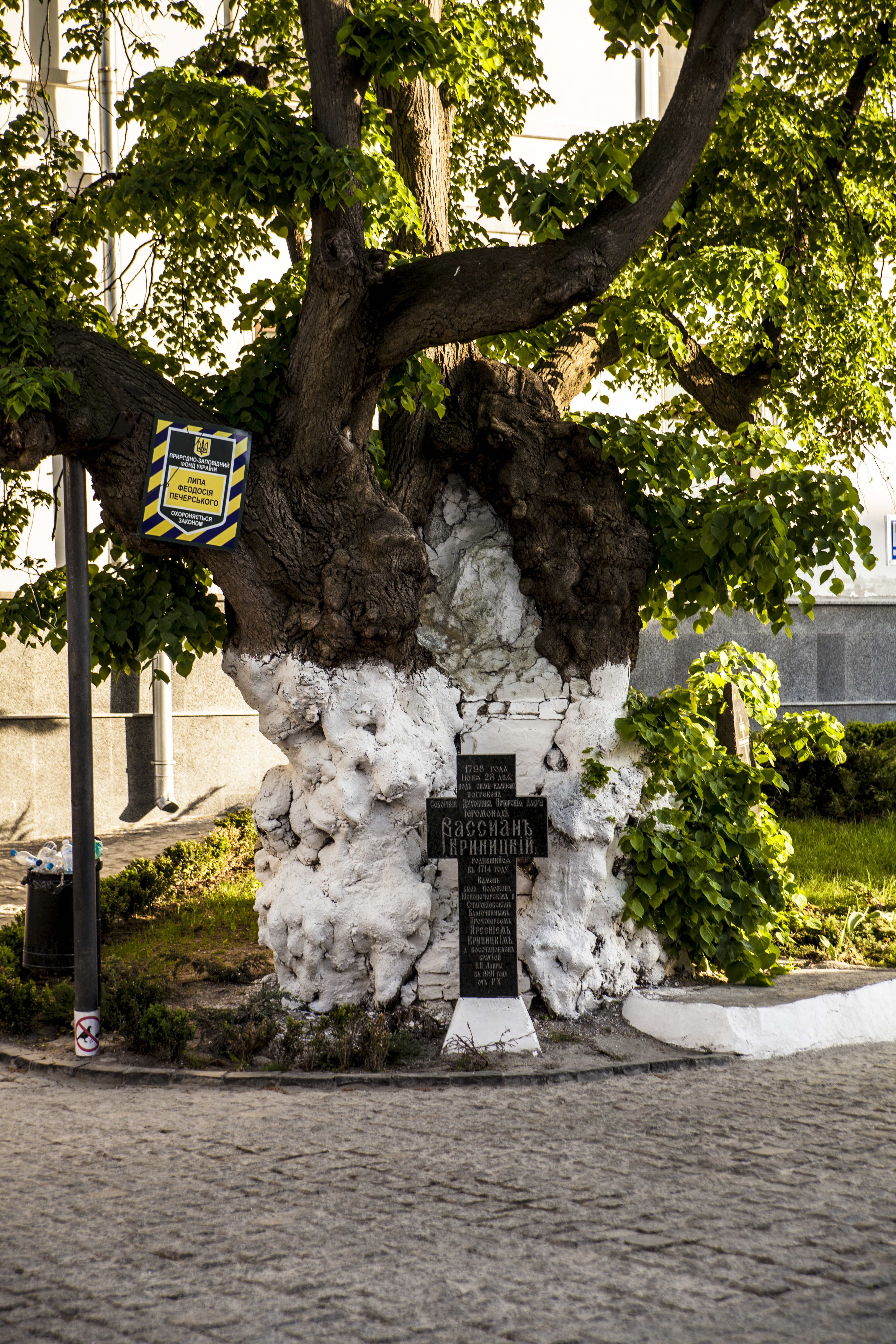 500—600 років. Обсяг 6,5 м. Висота 18 м. Липа на 300-400 років молодше за Феодосія Печерського, який її начебто посадив.